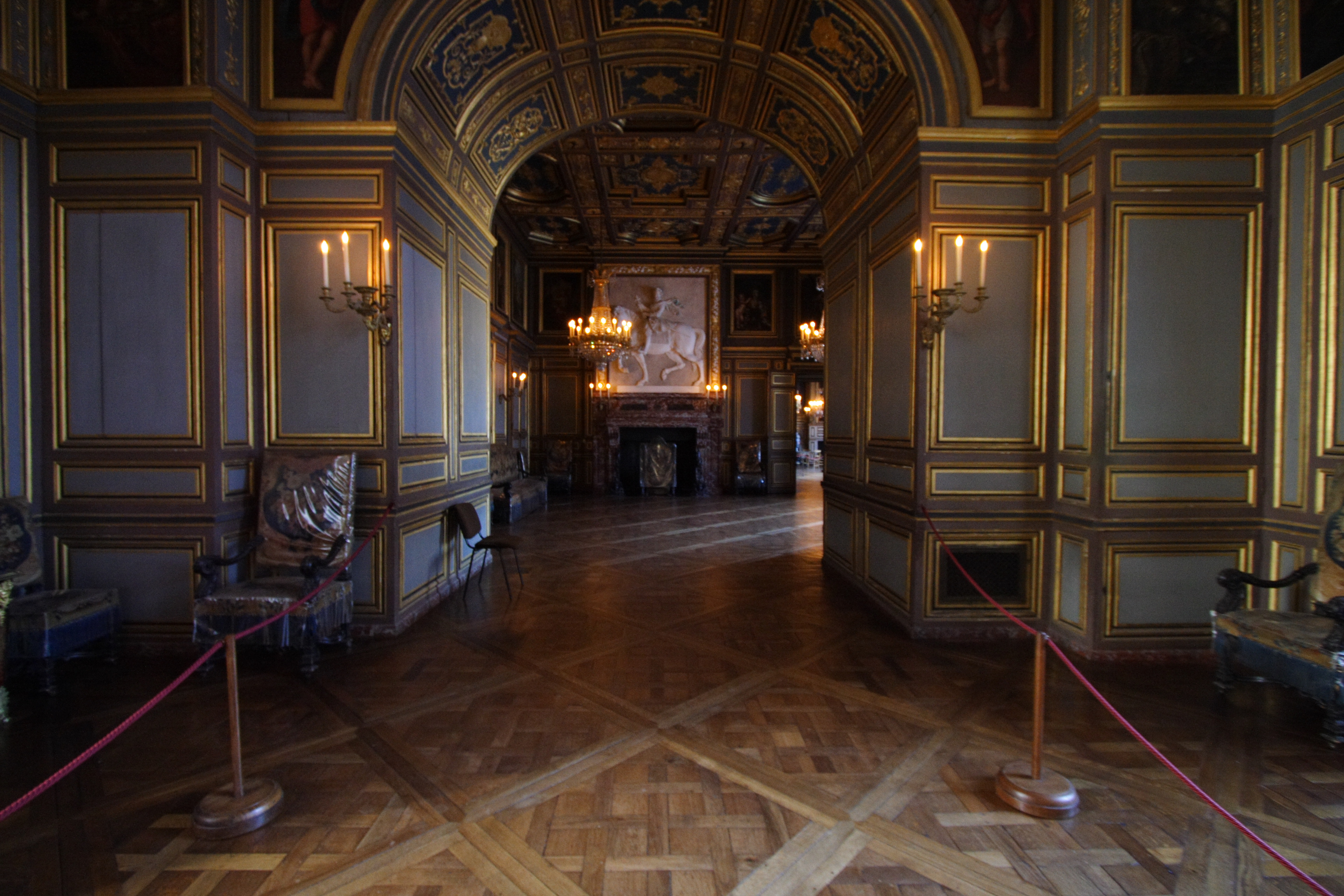 Der erste Saal Ludwigs des Heiligen im Schloss Fontainebleau, gesehen vom zweiten Saal Ludwigs des Heiligen